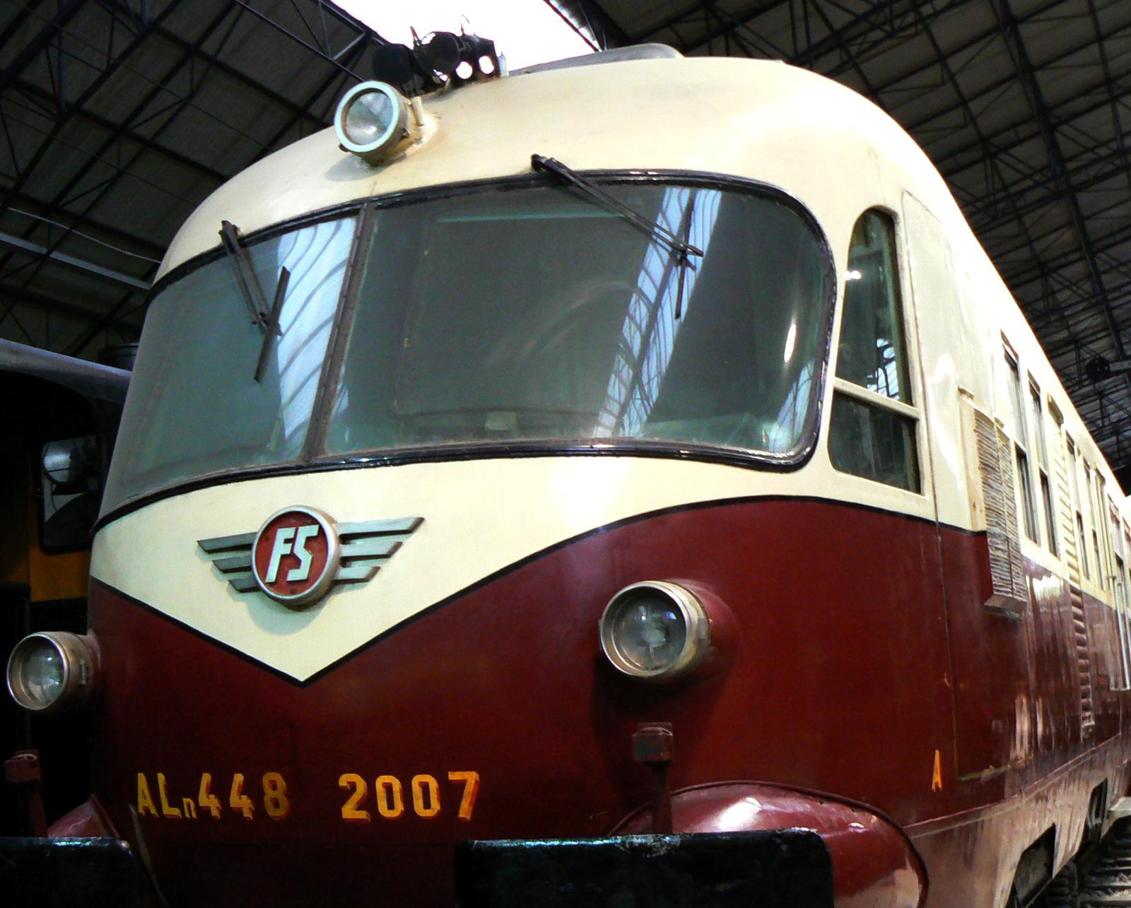 Exhibit in Milan's Museo della Scienza (science museum)